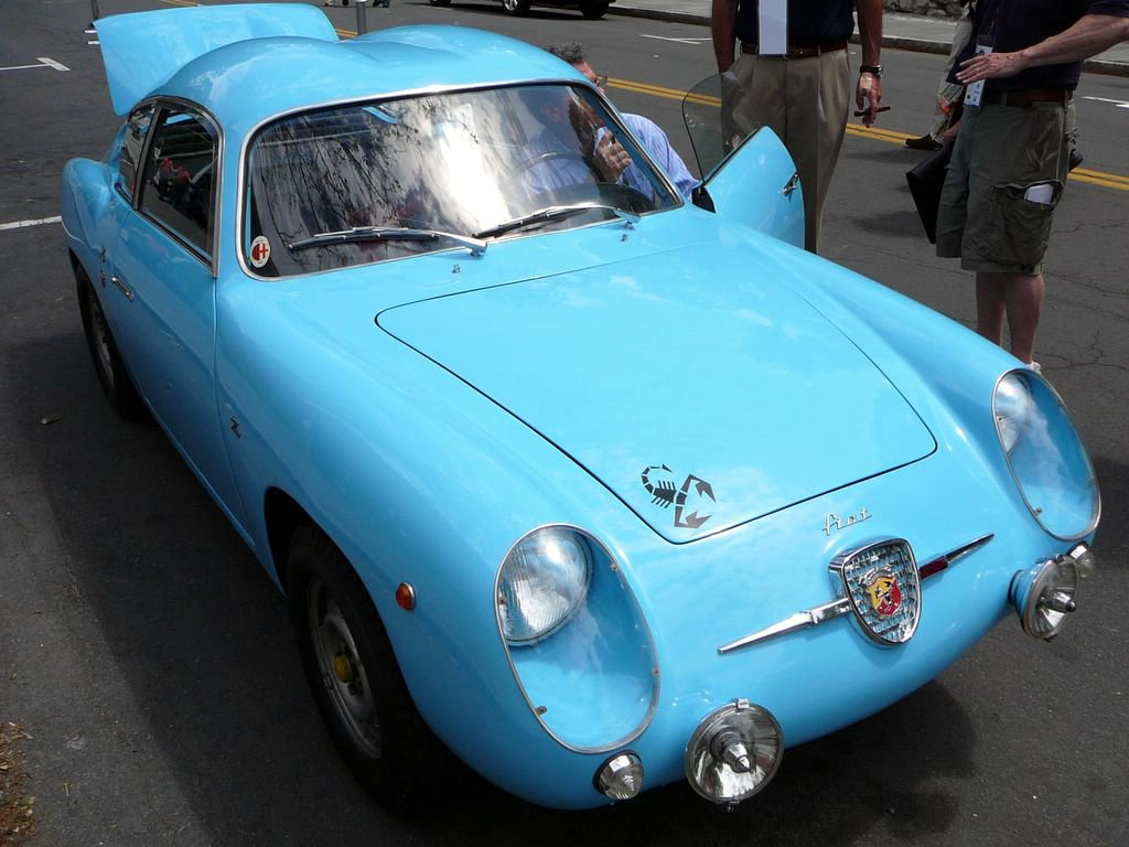 Фиат Абарт 750 Z.